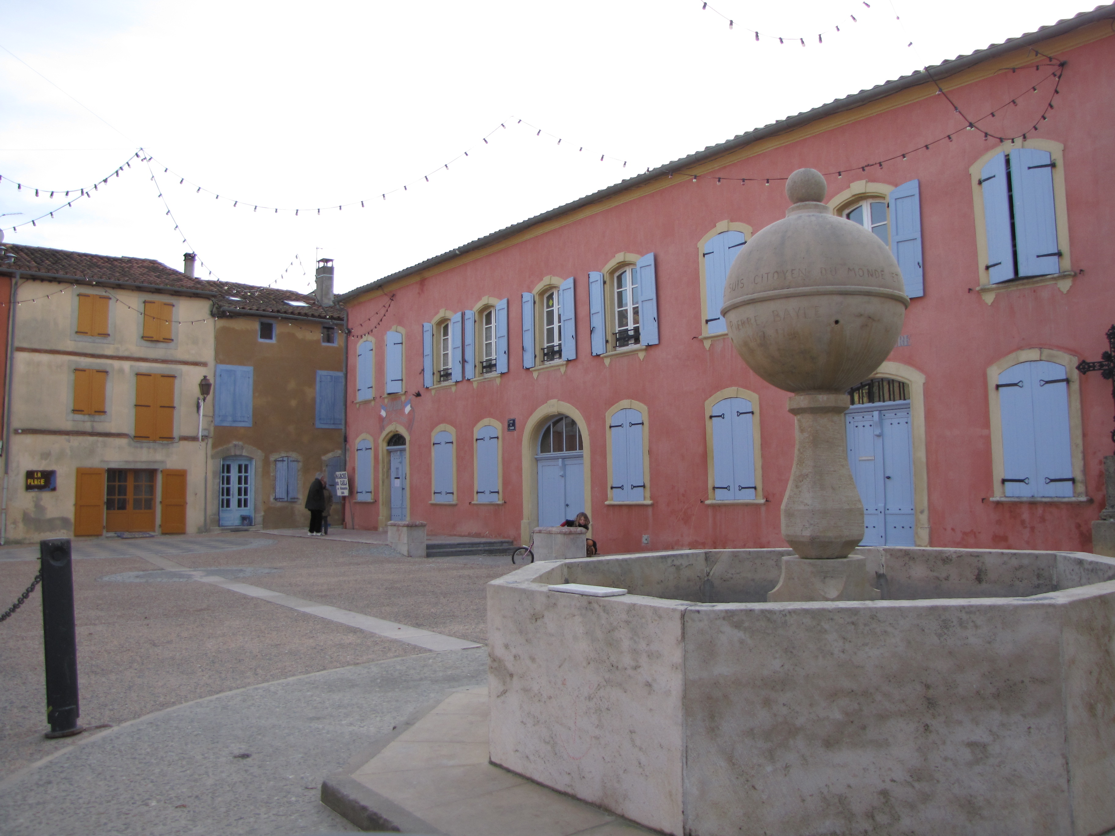 Mairie de Carla-Bayle